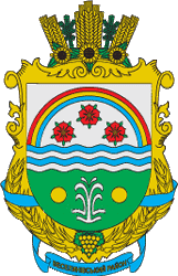 Герб Веселинівського району